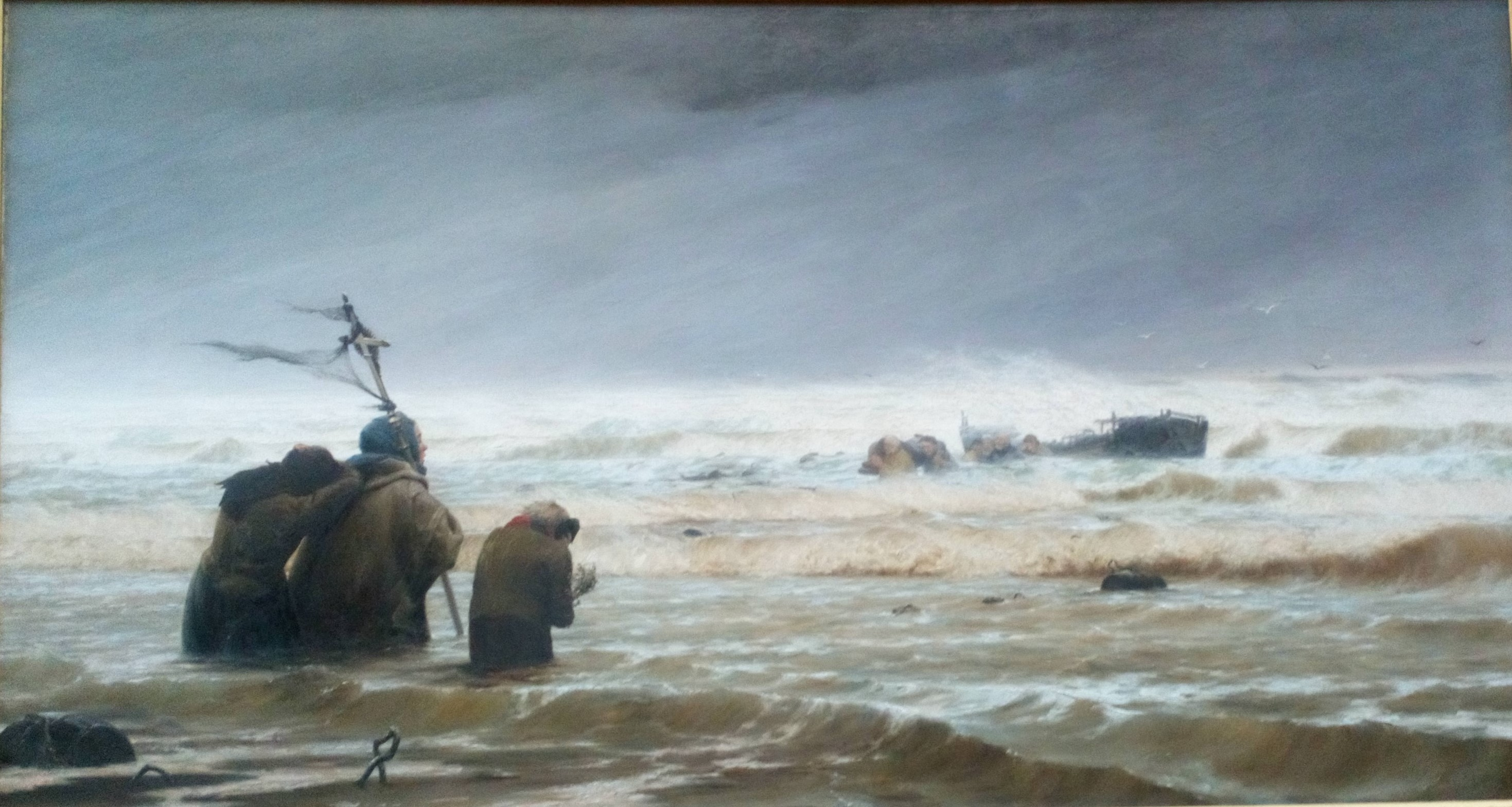 Amiens, musée de Picardie, Francis Tattegrain, Les Deuillants à Etaples (1883) 1